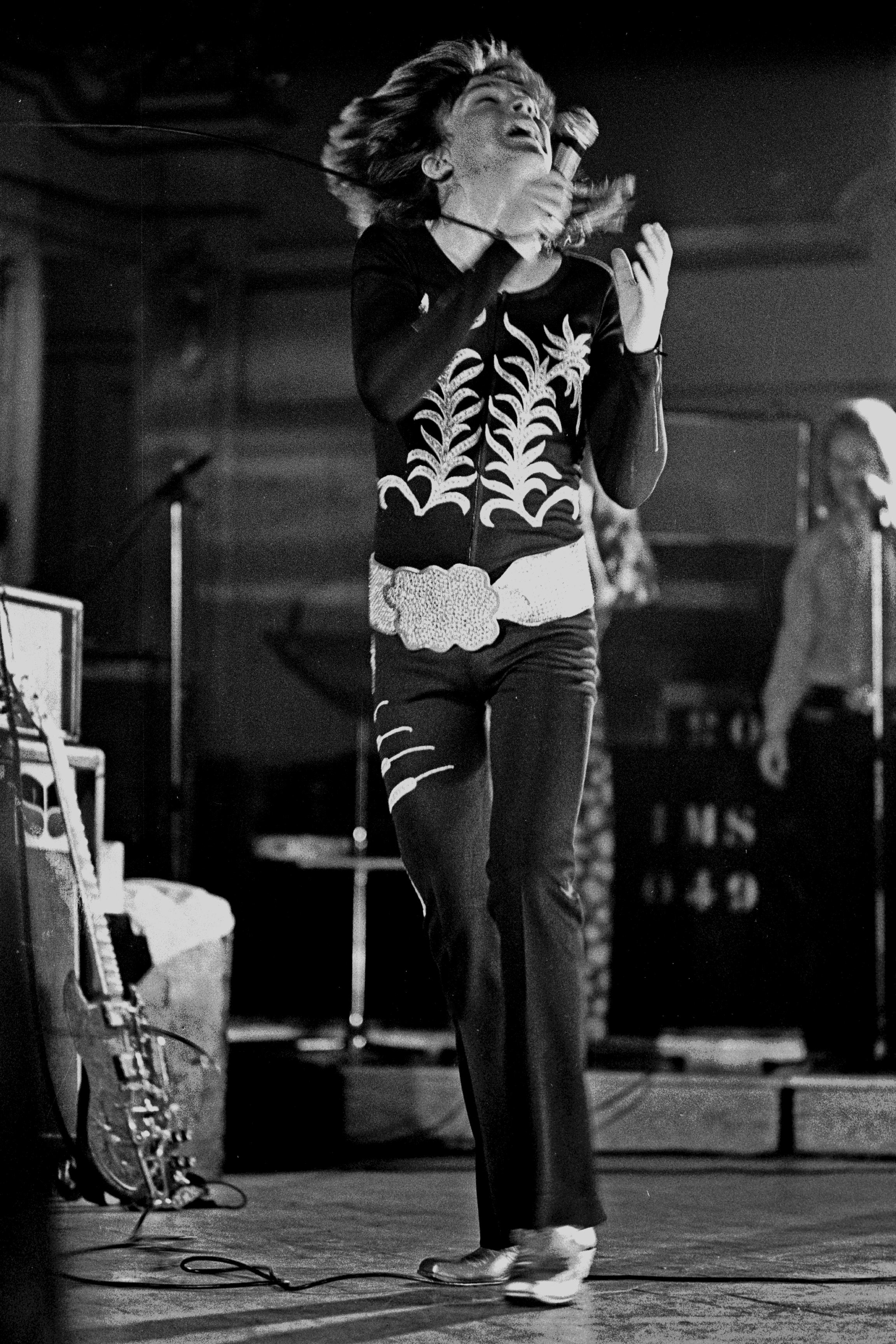 David Cassidy: 1972/73 auf dem Höhepunkt seines Ruhms und dem Gipfel des Erfolgs. Hier beim Auftritt in der Musikhalle Hamburg, März 1973